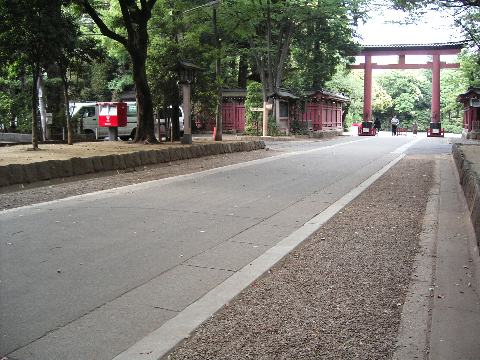 氷川神社参道。この写真は2005年(平成17年)5月20日に投稿者が撮影したものです。